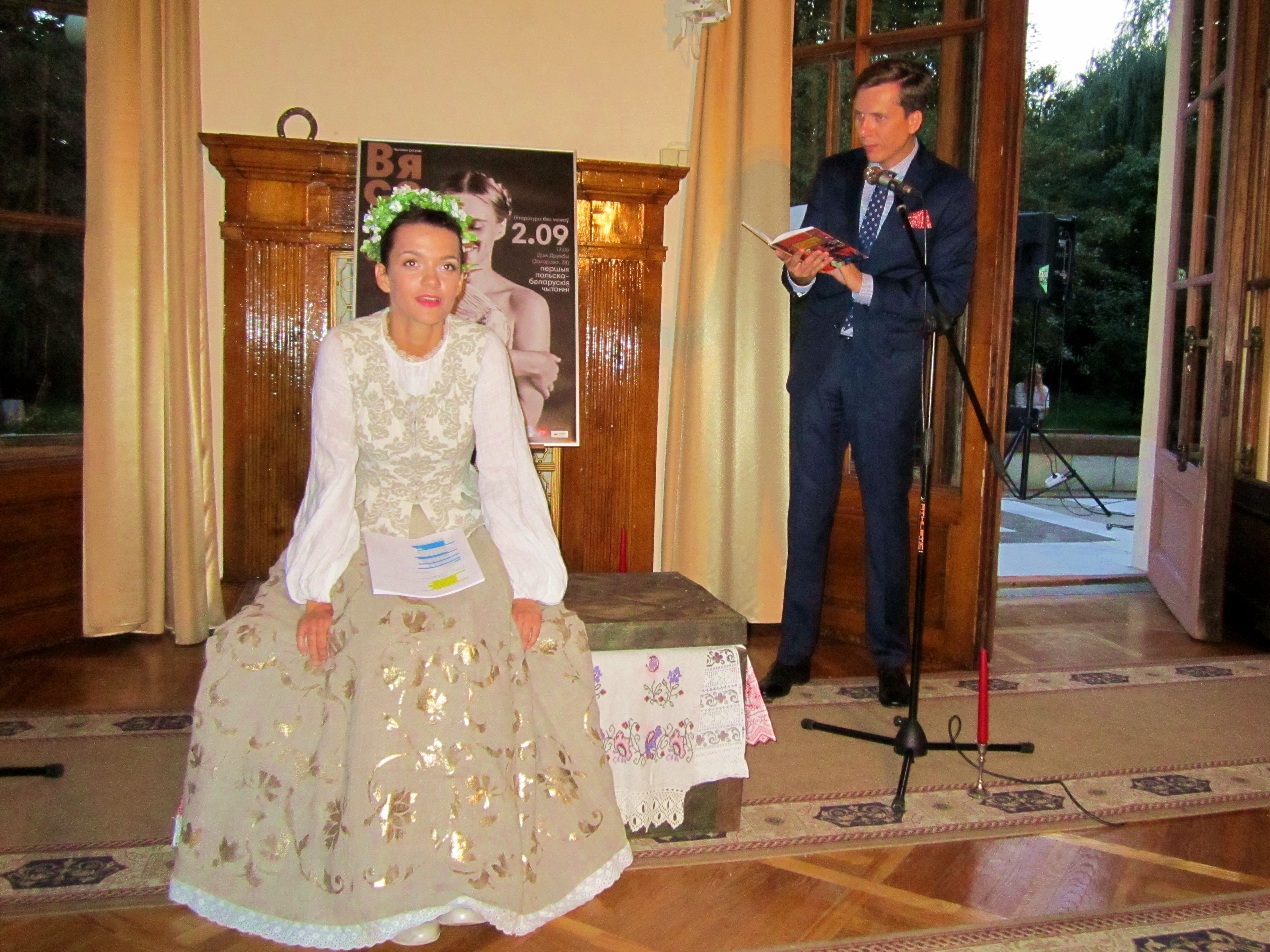 Narodowe Czytanie w Mińsku. Pierwsze wspólne polsko-białoruskie czytanie „Wesela” Stanisława Wyspiańskiego pod hasłem „Literatura ponad granicami”. Organizator wydarzenia - Instytut Polski w Mińsku. Swoją rolę czyta Dyrektor Instytutu polskiego w Mińsku pan Mateusz Adamski